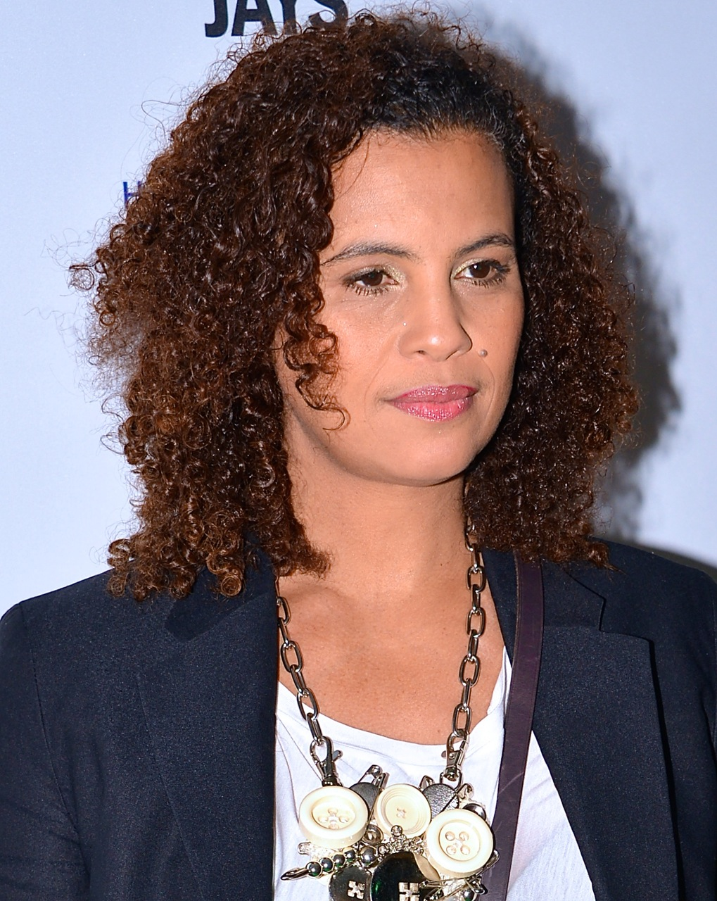 Neneh Cherry på Grammisgalan på Cirkus, Stockholm den 20 februari 2013.